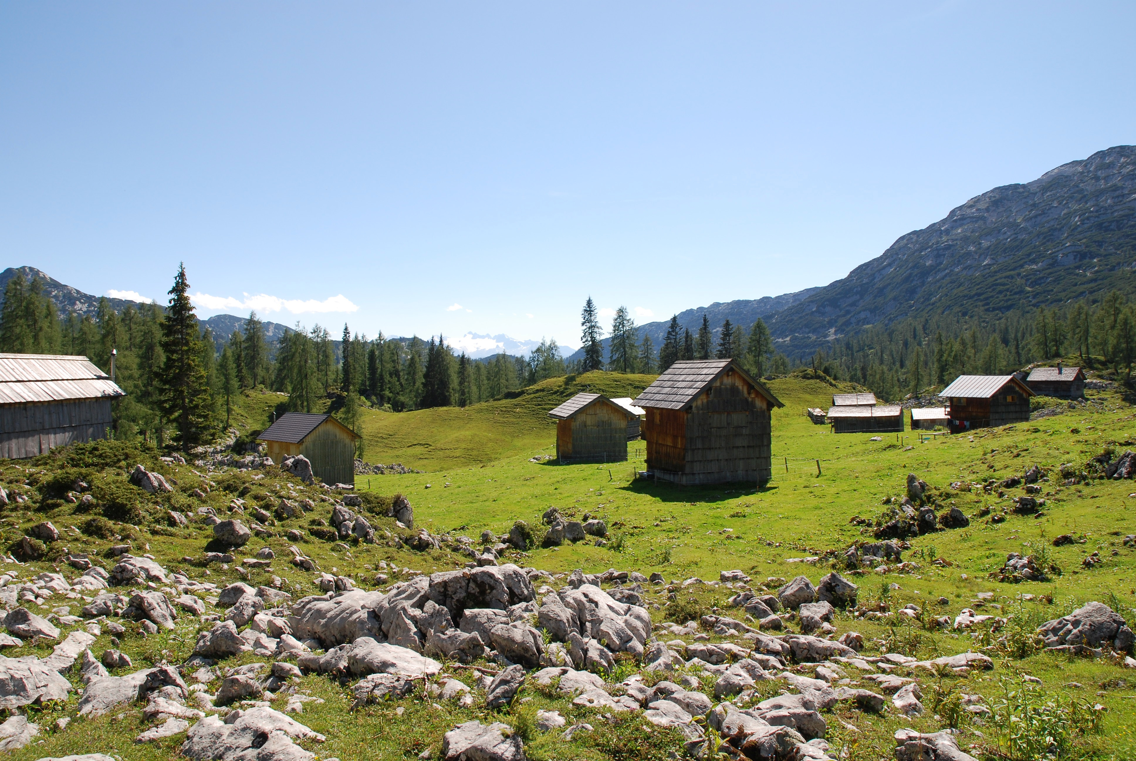 Wildenseealm, Totes Gebirge, Österreich